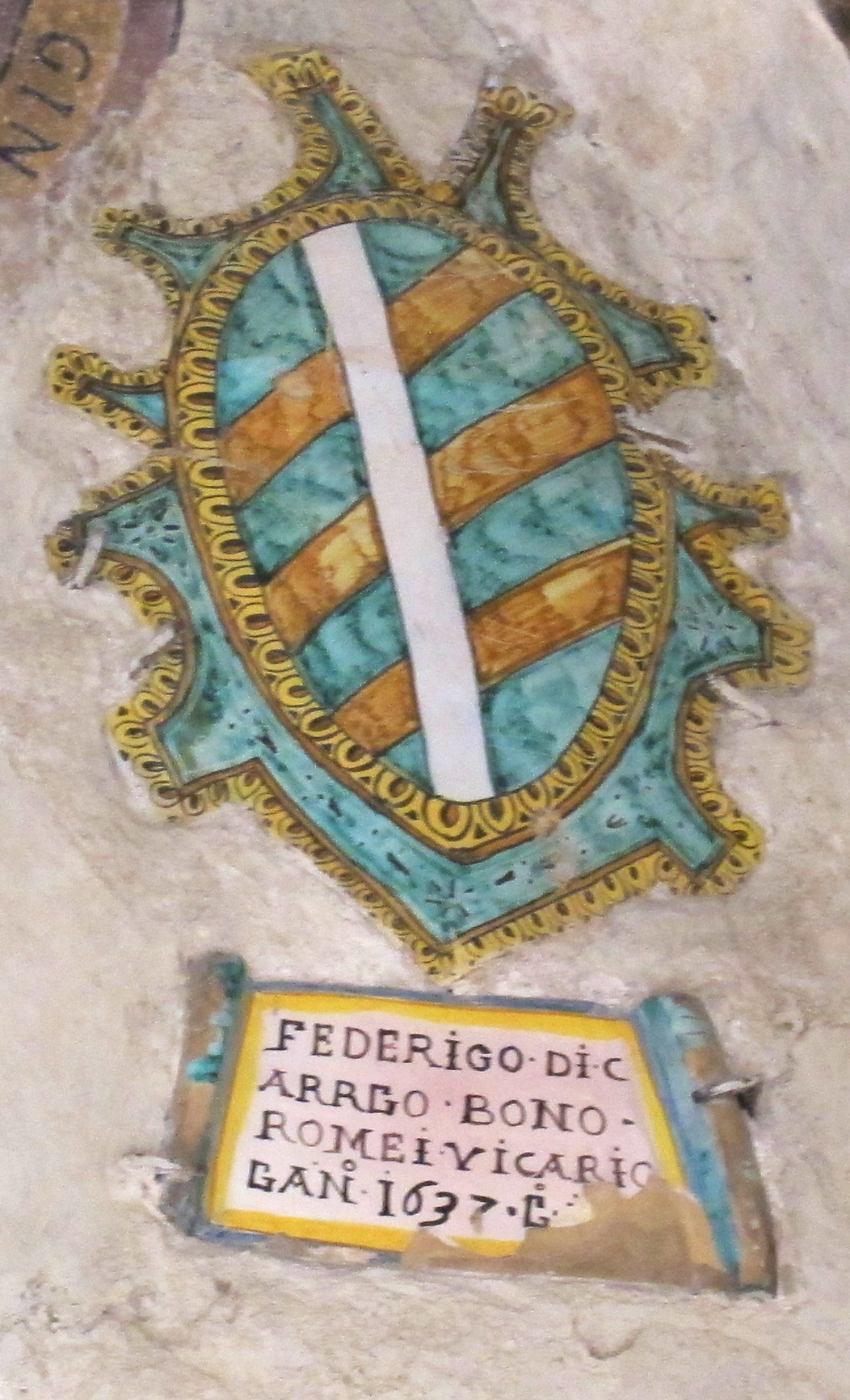 Palazzo vicariale di certaldo, stemma 24 borromei